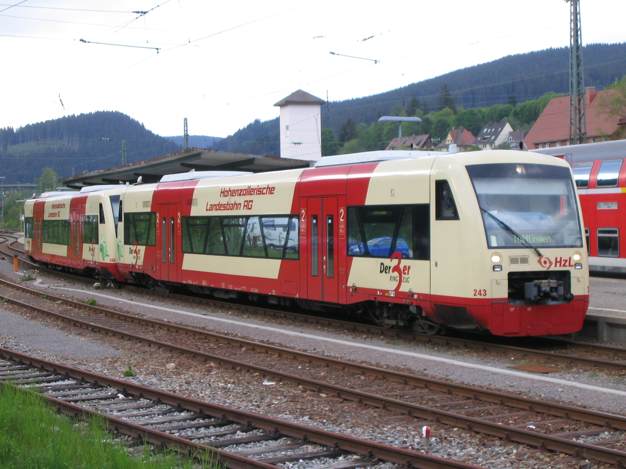 Ringzug am Bahnhof Neustadt (Schwarzwald)